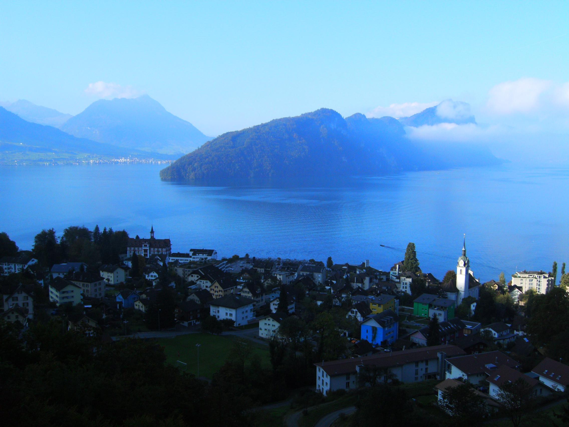 Paysage suisse. Au centre, le Bürgenstock (voir Bürgenstock), le lac est celui des Quatre Cantons, commune de Vitznau (canton de Lucerne) en dessous. Prise de vue : depuis le poste d'observation de l'ancien fort souterrain d'artillerie de Vitznau.